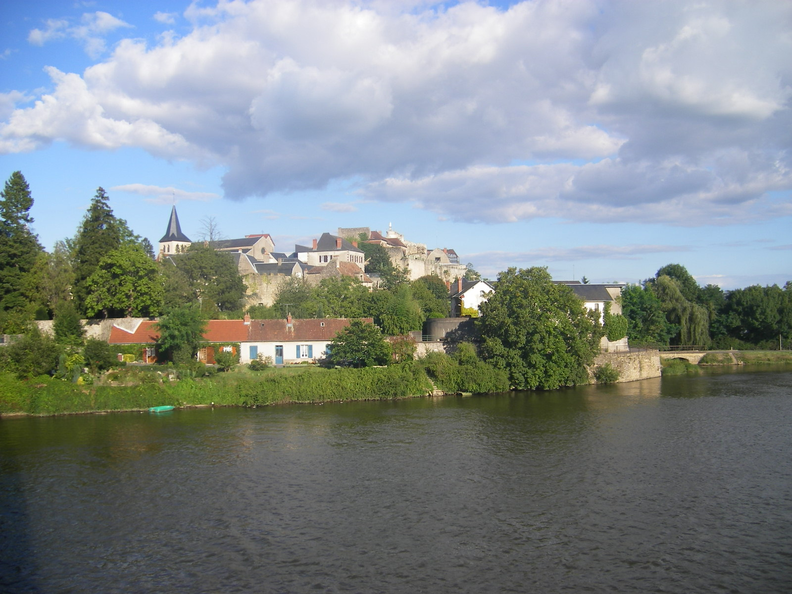 Decize